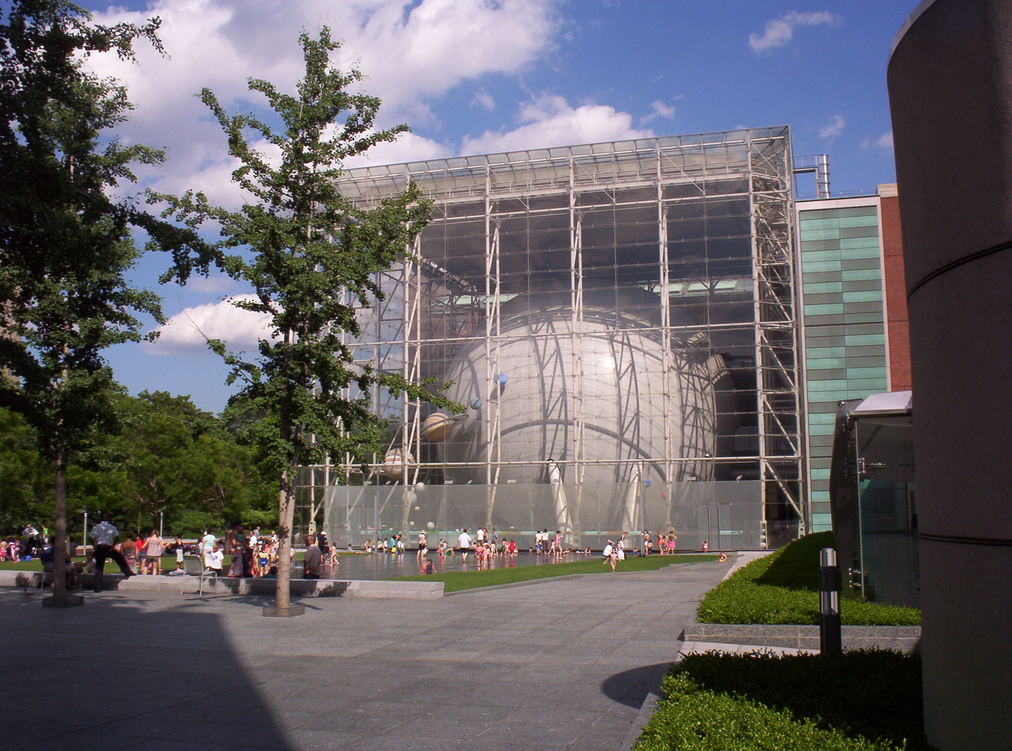 Planétarium Hayden à Manhattan, New York.